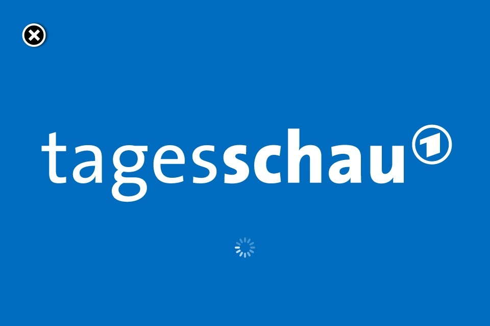 Tagesschau logoen